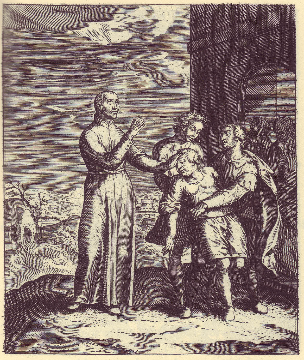 Ignacio realizando curaciones en azpeitia